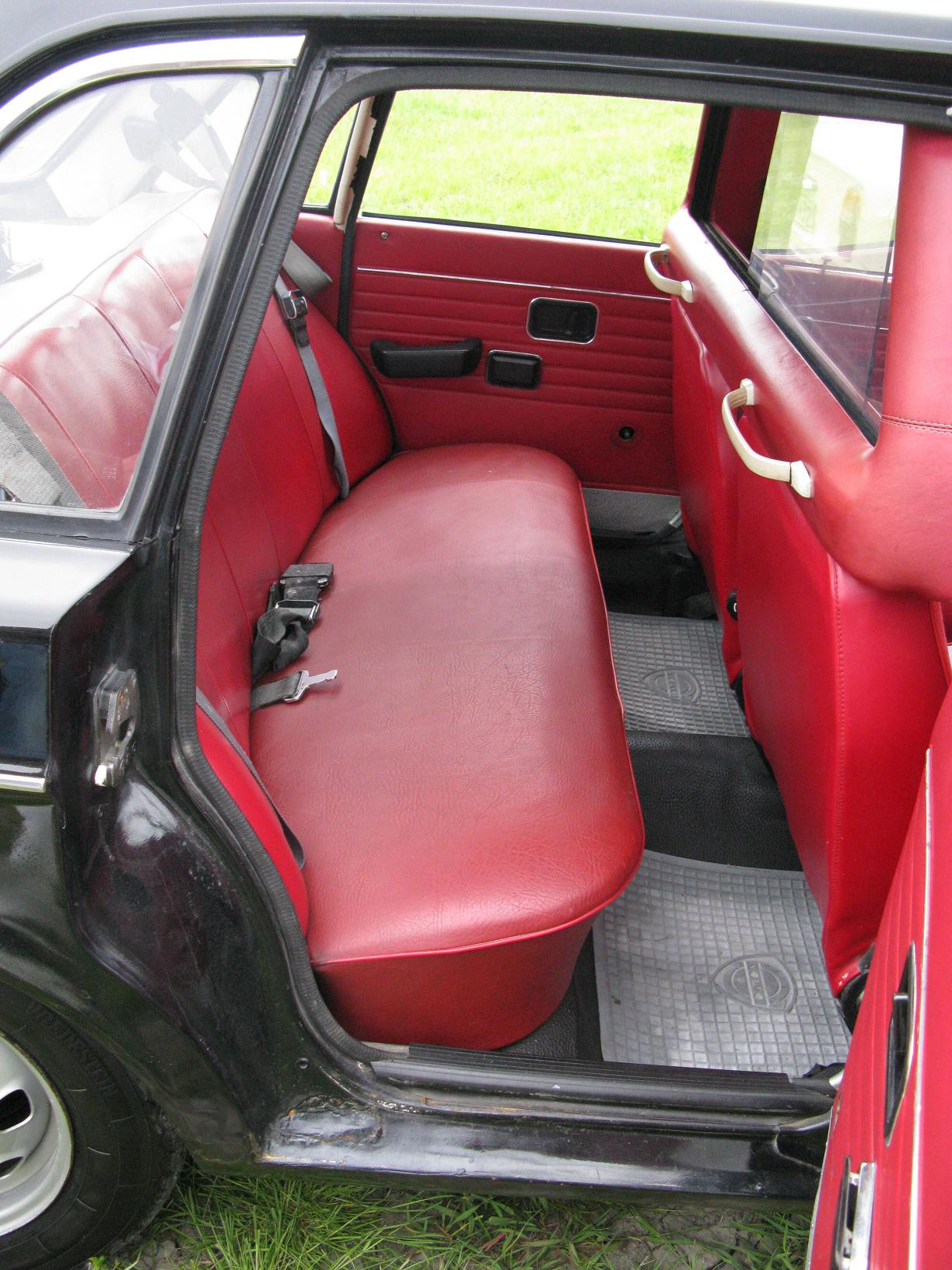 Volvo 144 Taxi